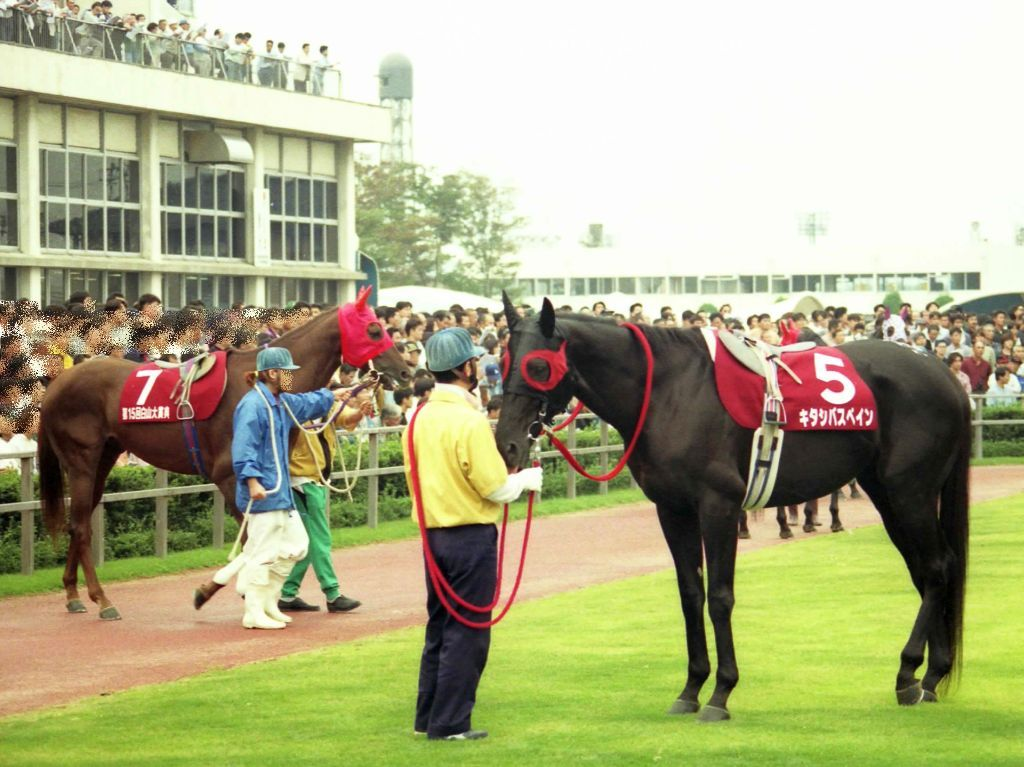 平成7年(1995年)金沢競馬場パドック。手前(ゼッケン5)がキタシバスペイン(奥(ゼッケン7)はミスタールドルフ)。白山大賞典出走。